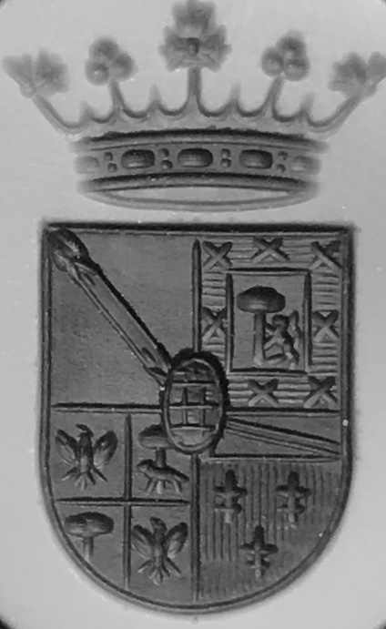 Escudo Completo del Marqués de Antella, en el que se observa el escudo de la familia Pallavicino en el centro